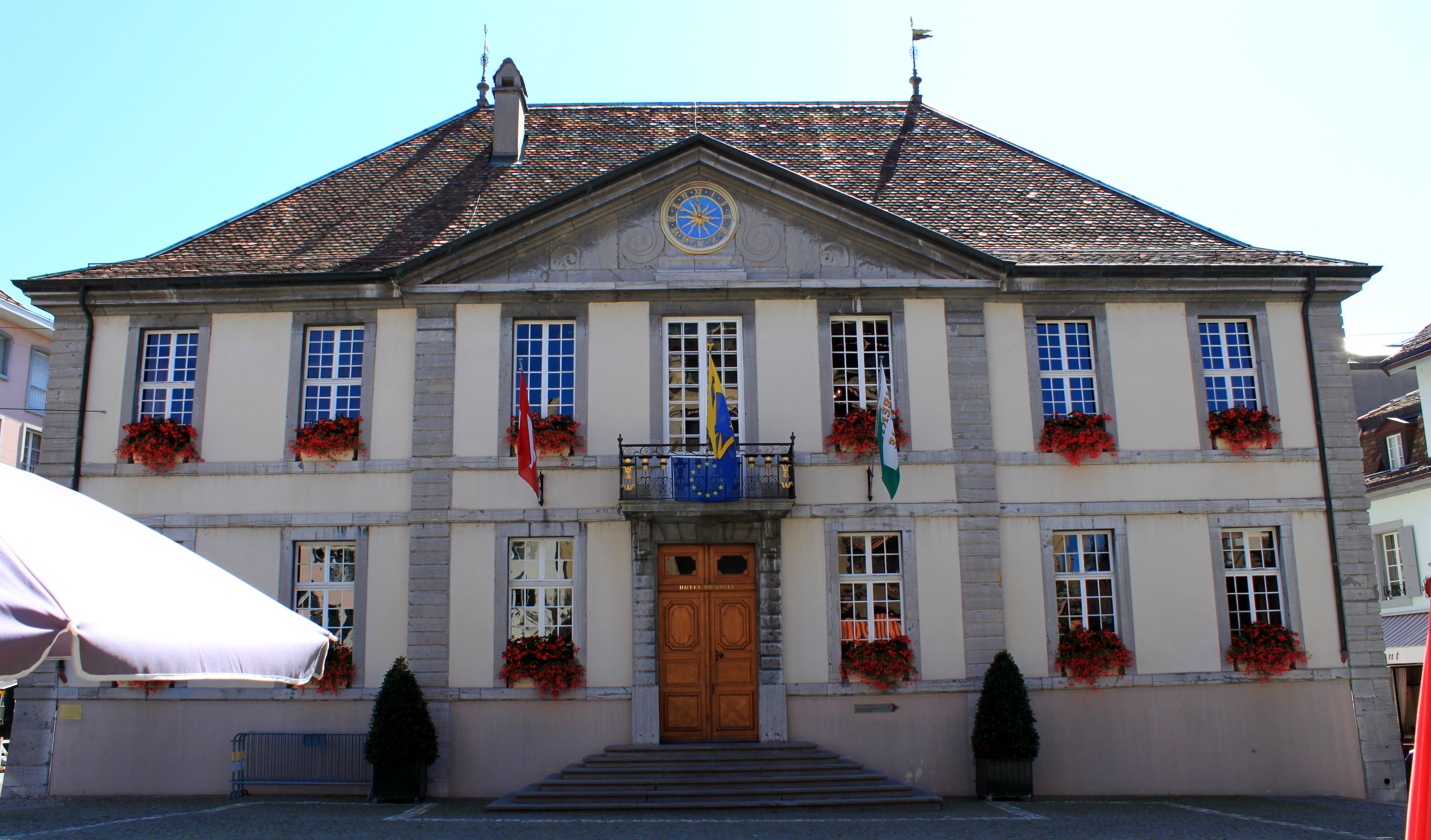 Suisse, canton de Vaud, Vevey, Hôtel-de-Ville. Cet édifice de style Louis XV fut en partie construit en 1710 et terminé en 1755. A voir la Salle des Pas Perdus, la très belle rampe en fer forgé et l'Horloge de 1709.